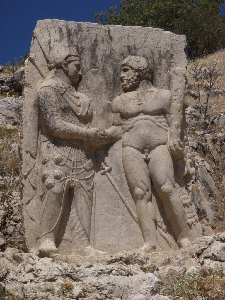 Stele Mithridates mit Herakles in Arsameie